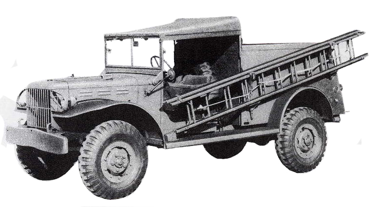 Dodge WC59 utilisé pour les installations téléphoniques de l'US army durant la 2nde guerre mondiale